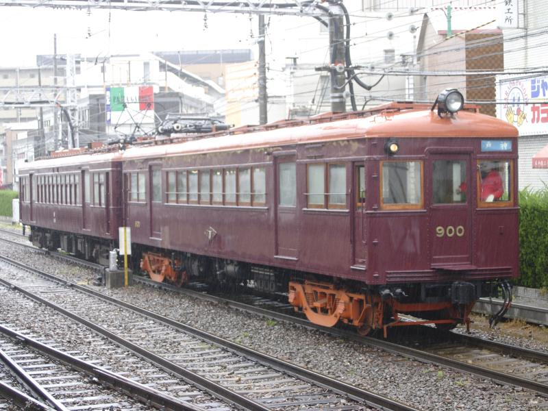 阪急電鉄900号 正雀駅にて イベント終了時の入れ換え時にて撮影